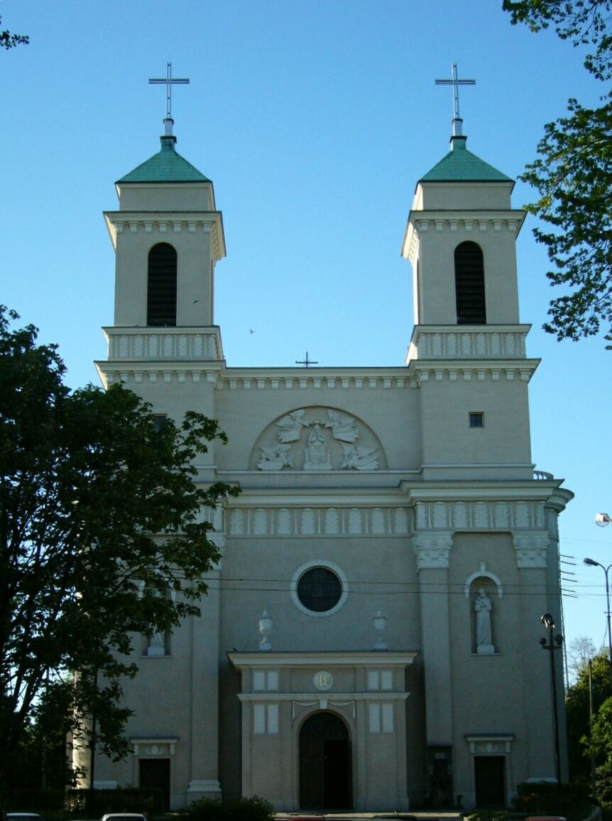 Kościół pod wezwaniem św. Kazimierza w Łodzi